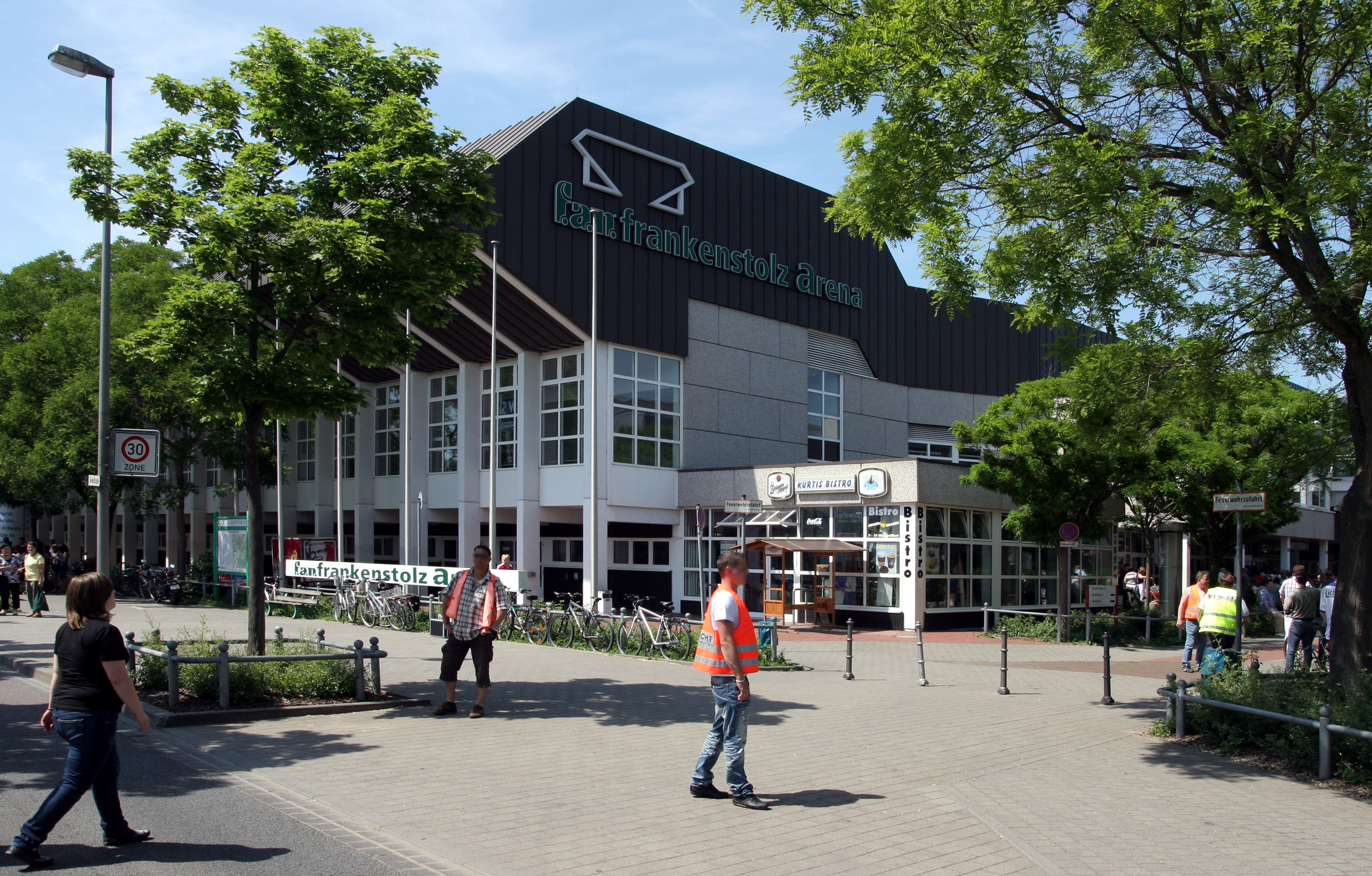 Die f.a.n. frankenstolz arena vor dem Handball-Bundesligaspiel (TV Großwallstadt - MT Melsungen) am 23. Mai 2009